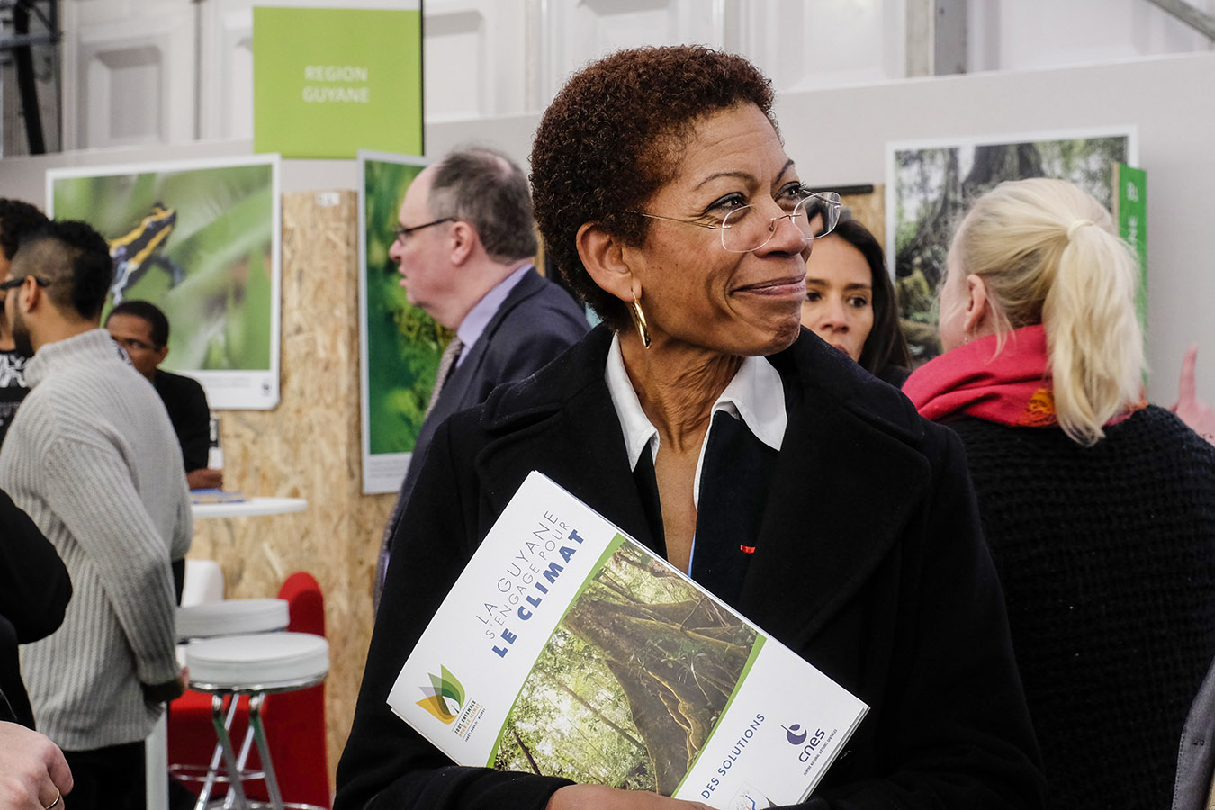 George Pau-Langevin, ministre des Outre-Mer